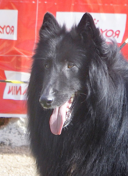 Ch.Fredy de Belliamici, Sujeto recomendado de Francia, Campeón del Club Español del Perro de Pastor Belga Sujeto Seleccionado del C.E.P.P.B. Campeón de España